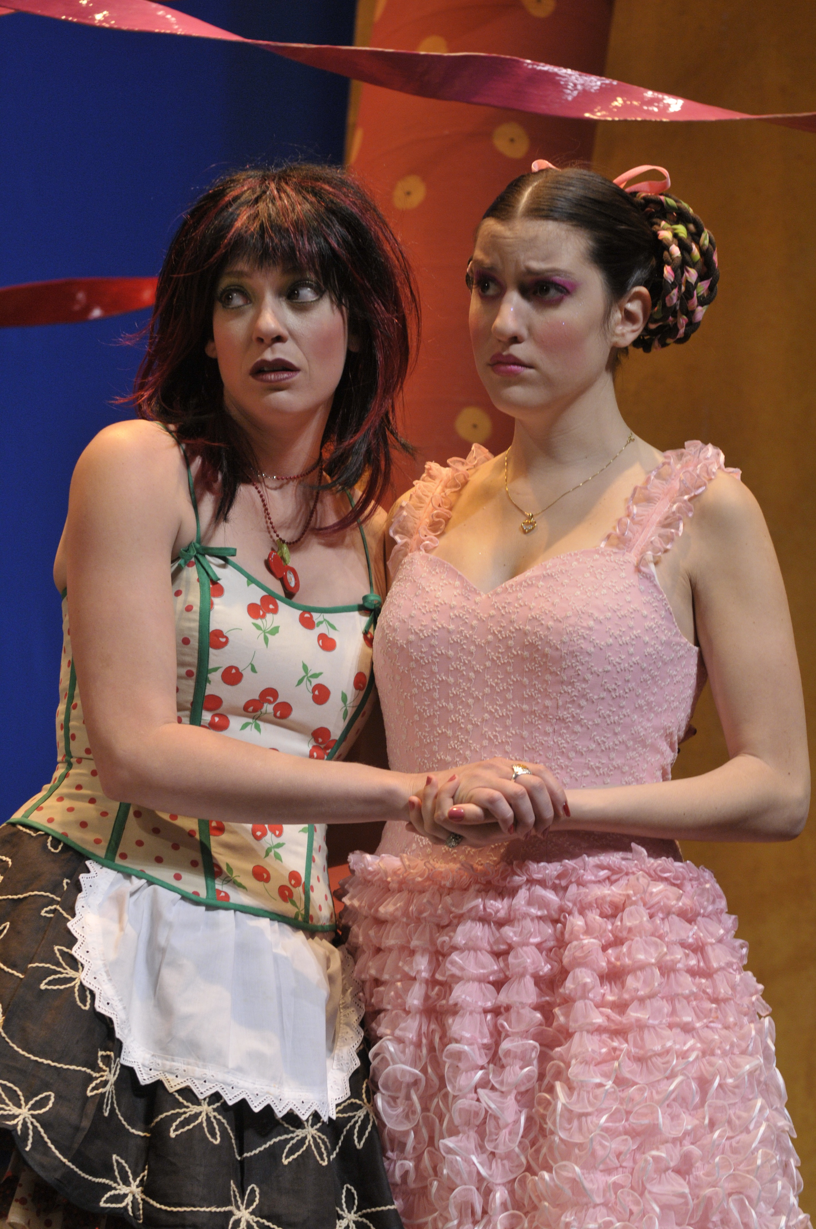 שירי גדני בהצגה משרתם של שני אדונים